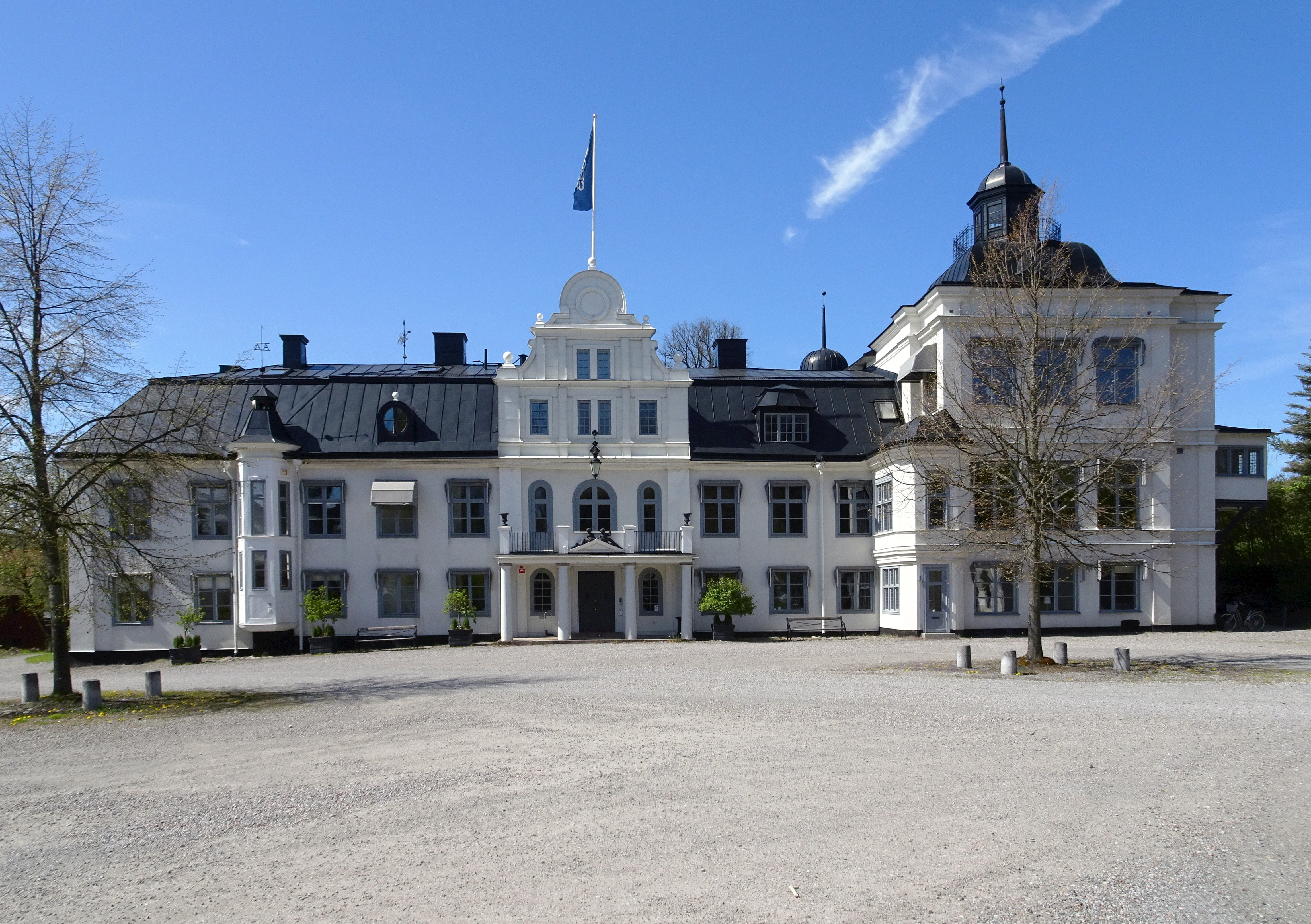 Stora Frösunda, huvudbyggnad